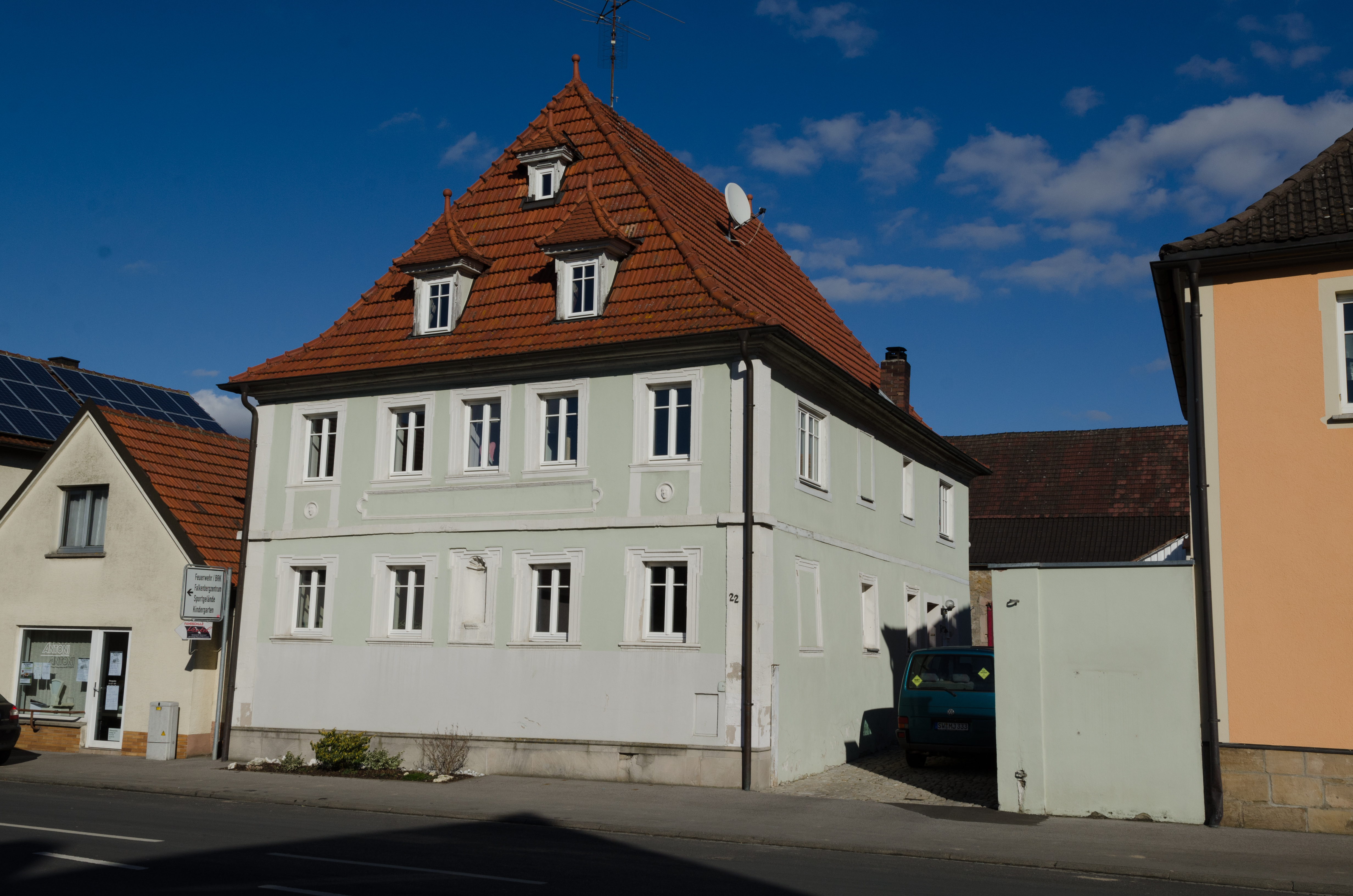 Donnersdorf, Hauptstraße 22